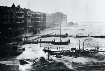 中文（香港）: 1906年9月18日香港丙午風災中，颶風吹襲維多利亞港的情形，圖為干諾道中海旁；明報轉載香港海事博物館。